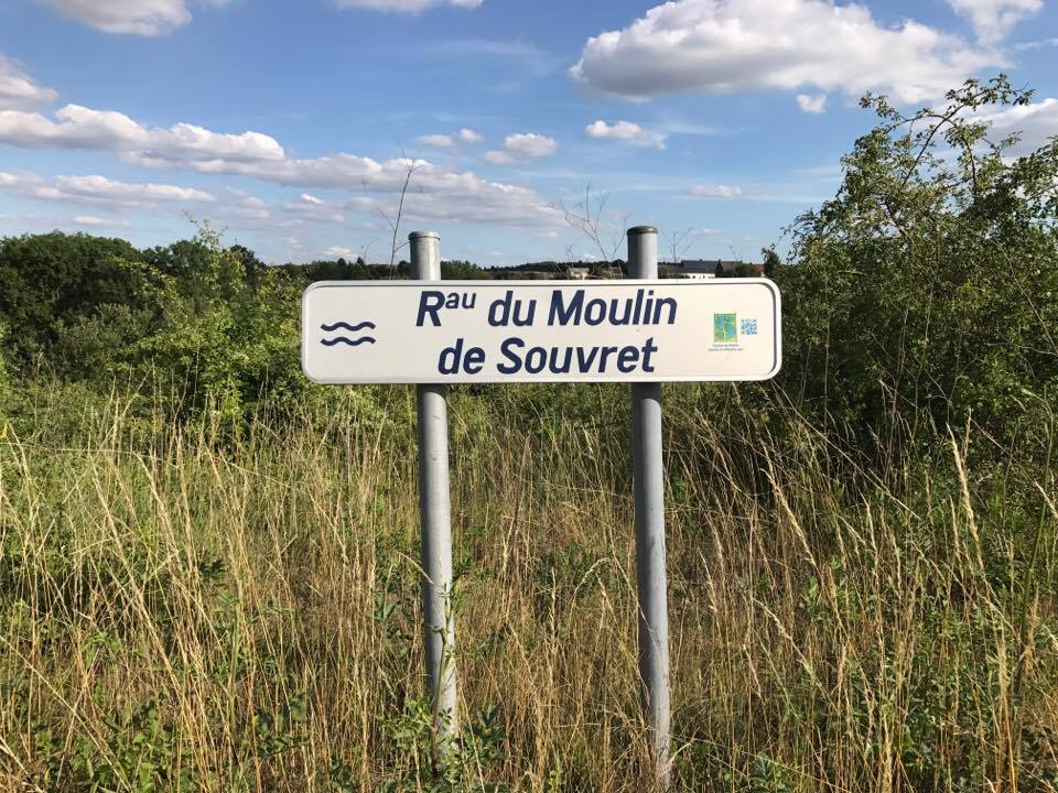 Plaque informative - Ruisseau